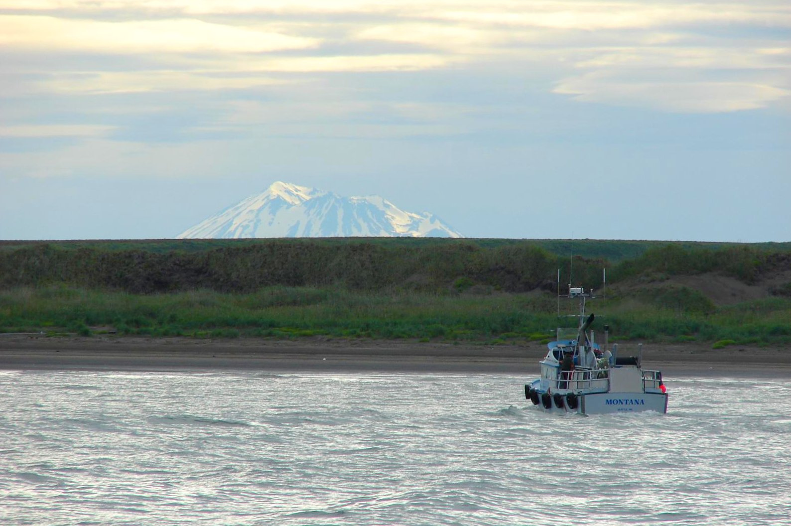 Bristol Bay (near Ugashik Bay), Alaska